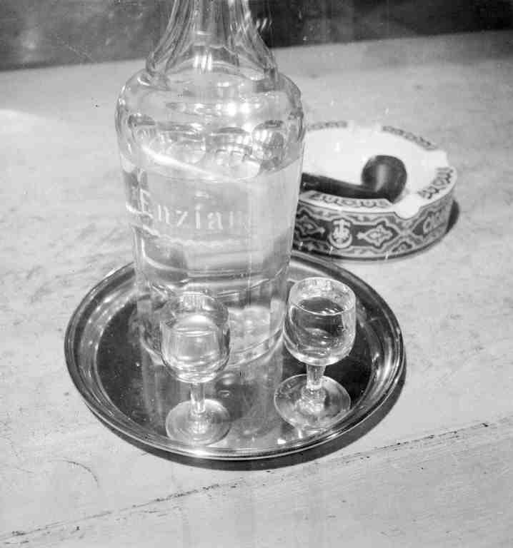 Enzian-Schnaps in beschrifteter Glasflasche, aufgenommen in Abländschen (Schweiz)